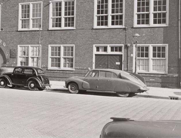 ND-29-06 Tatra 87